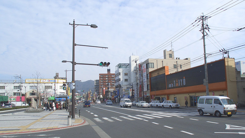 JRja:鹿児島本線ja:門司駅 駅前風景 南口駅前から北東を見る。 道路はja:国道3号、奥の横断歩道は門司駅前東交差点。 良い写真があれば差し替えてください。 撮影者/著者/著作権保有者 : MK Products (本人がアップロード) 撮影日 : 2007/01/19 門司駅用にアップロードした画像です。良い画像があれば別の画像に変えてください。